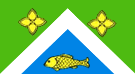 Прапор Заставнівського району